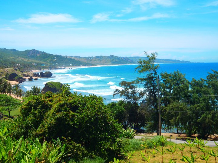 Barbados beaches (2007)